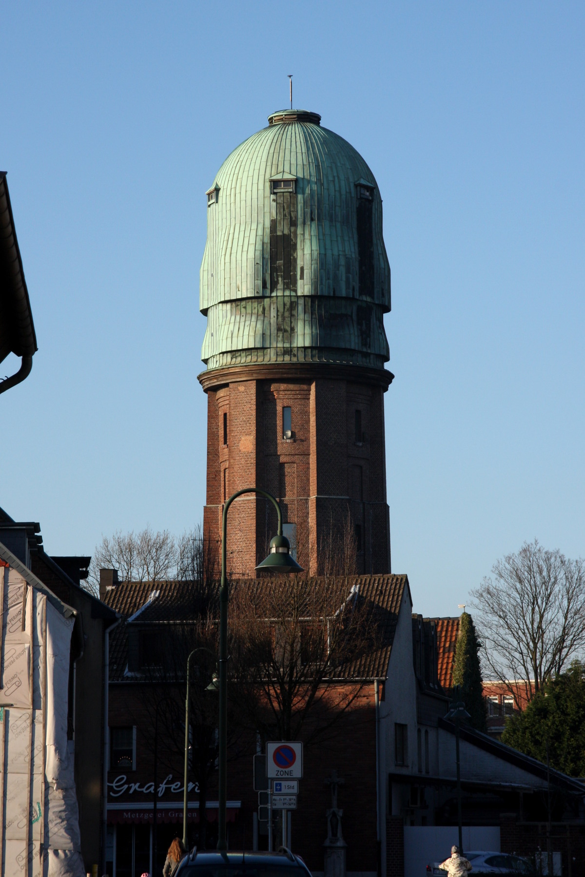 Der Wasserturm von Würselen-Bardenberg, Deutschland